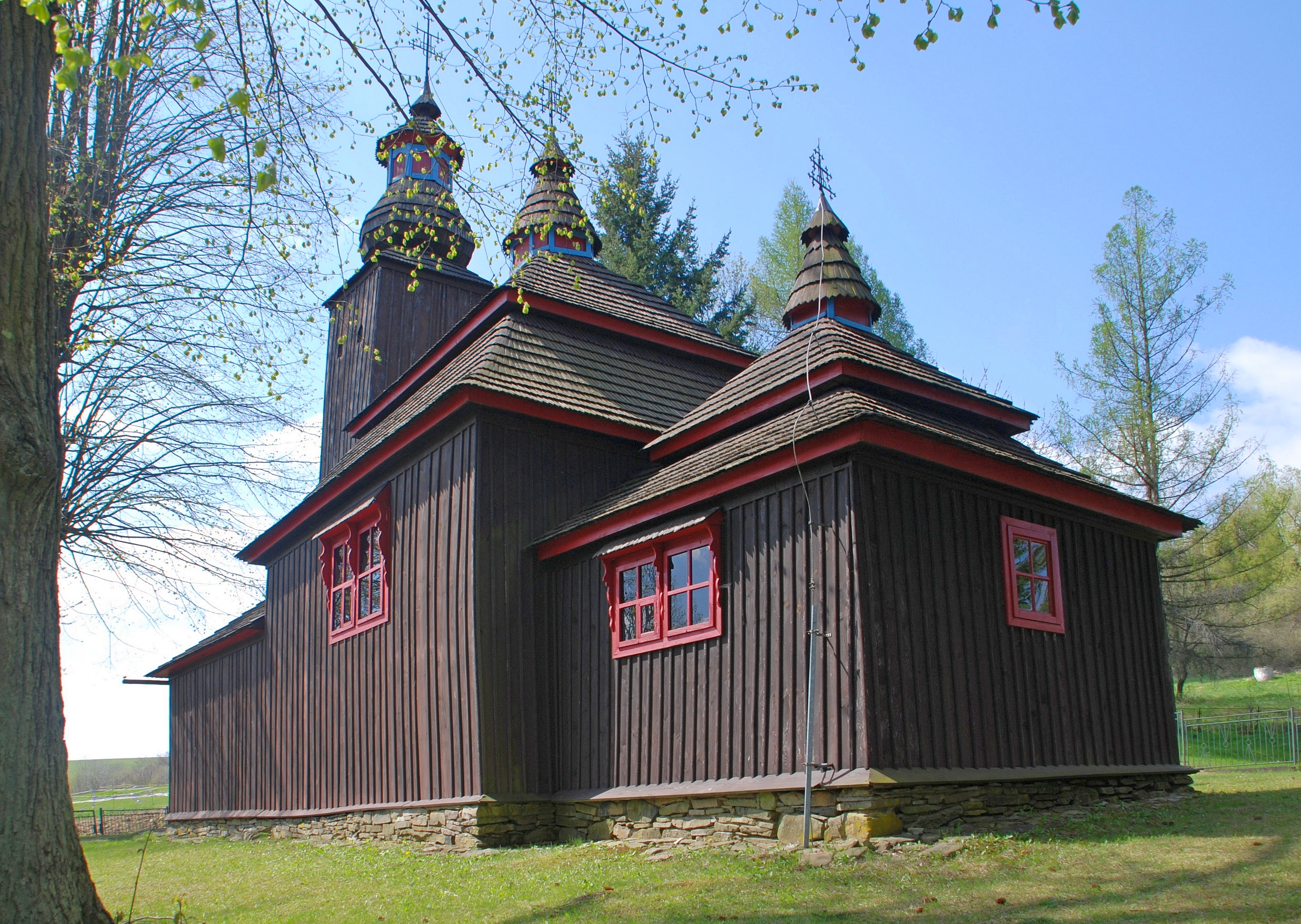 wieś Šemetkovce